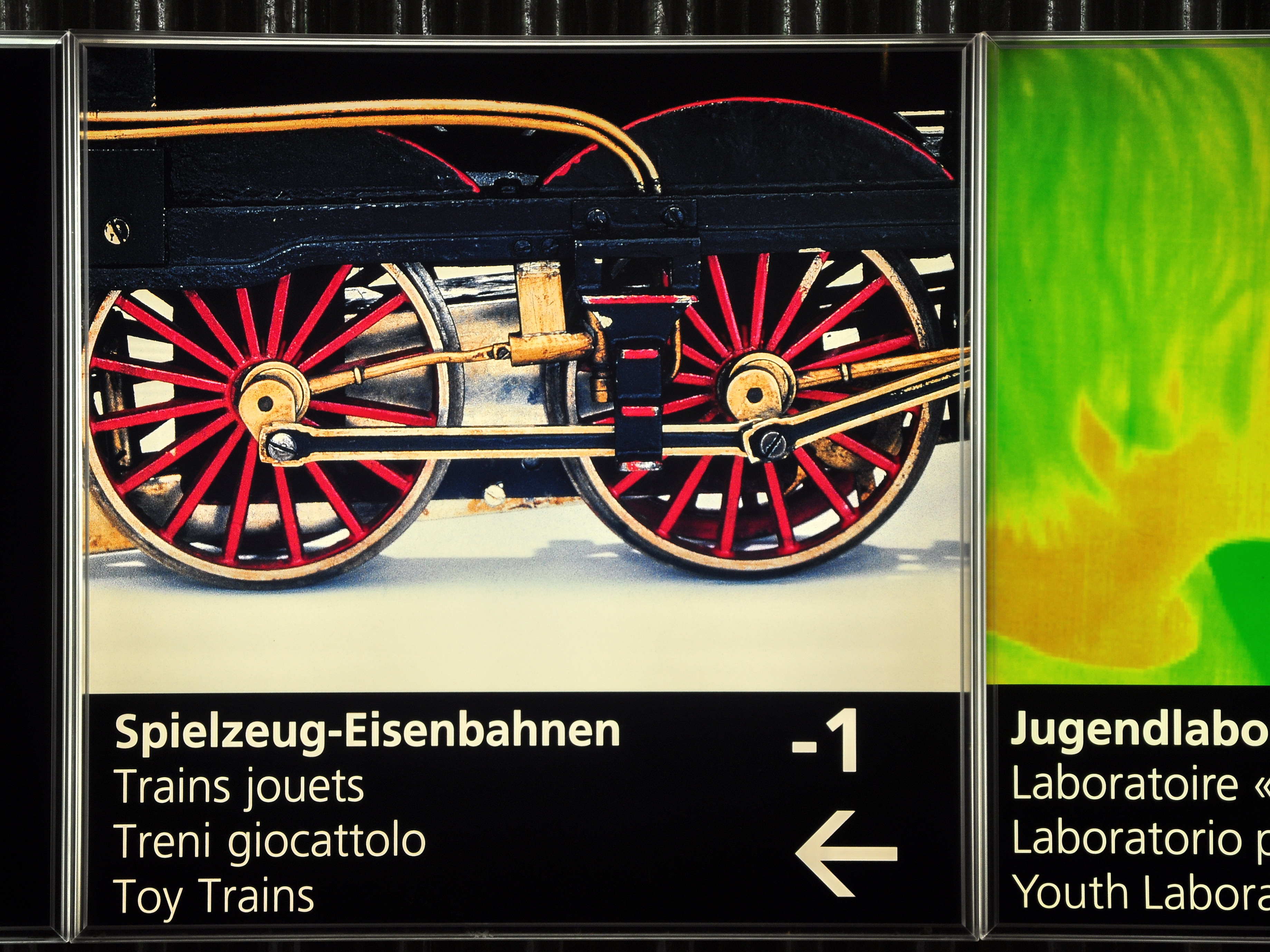 Spielzeugeisenbahn-Sammlung Bommer (Technorama), Technoramastrasse 1 in Winterthur (Switzerland)